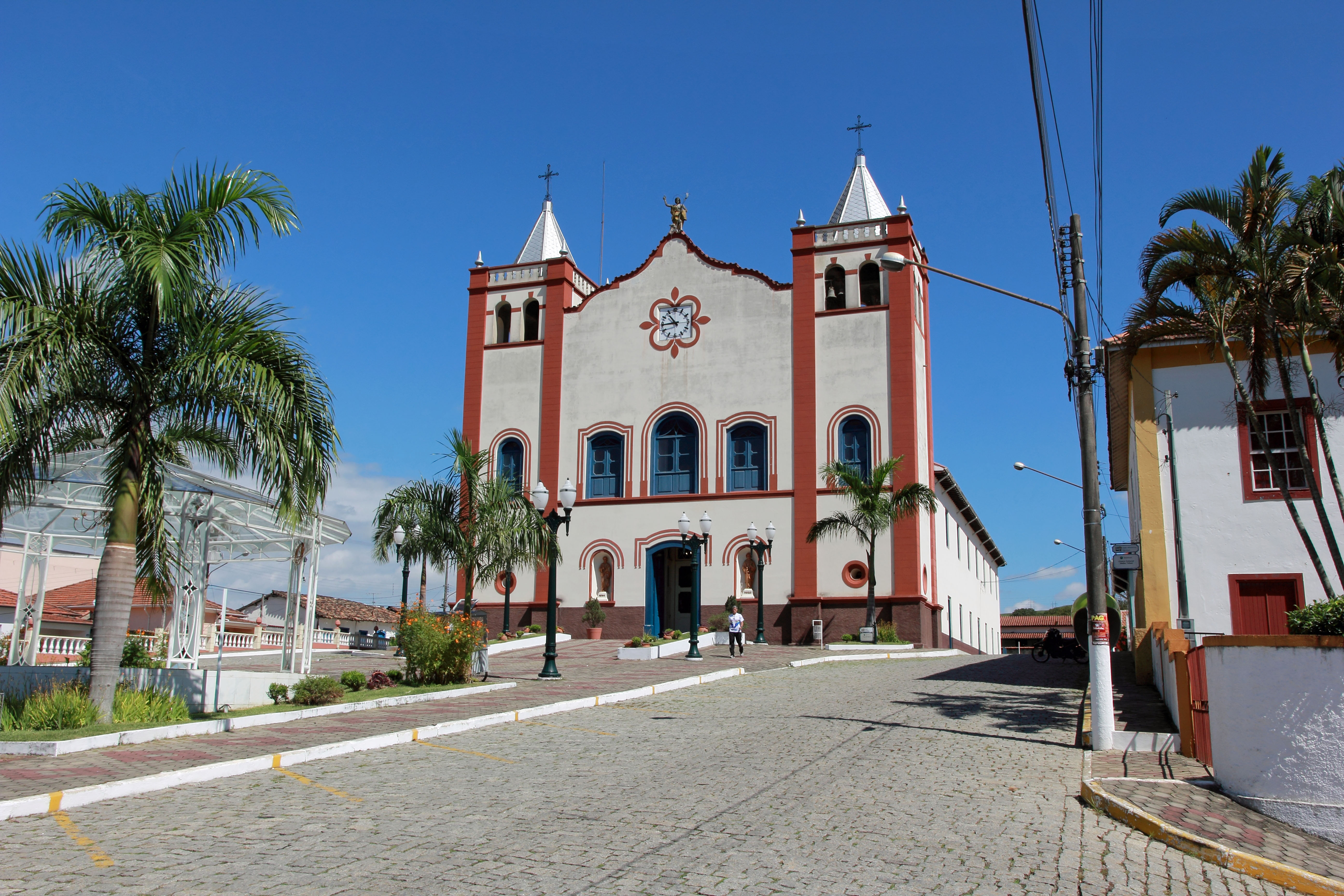 Igreja Matriz de São João Batista em Queluz, SP.